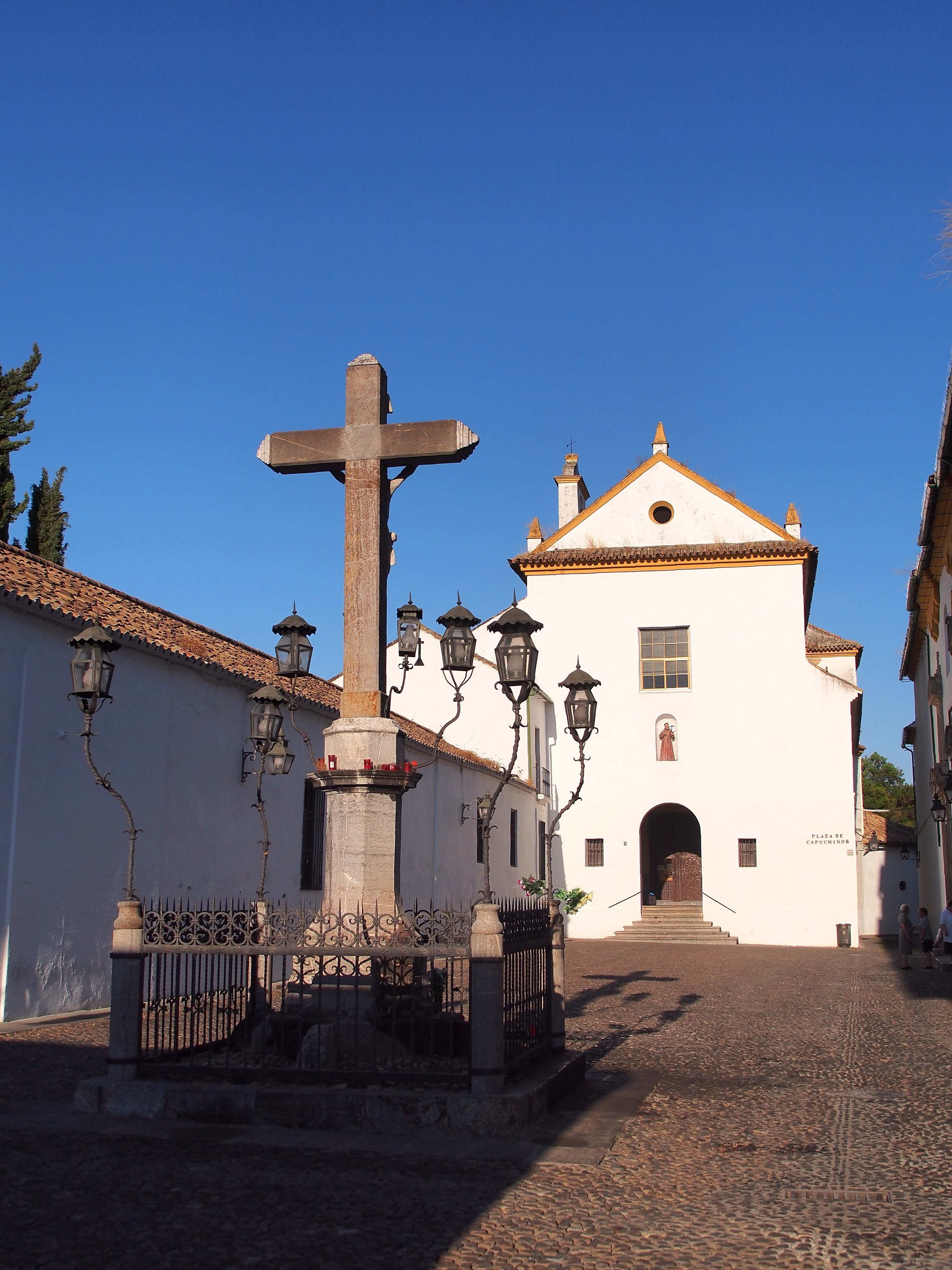 Plaza de Capuchinos - 2013.07